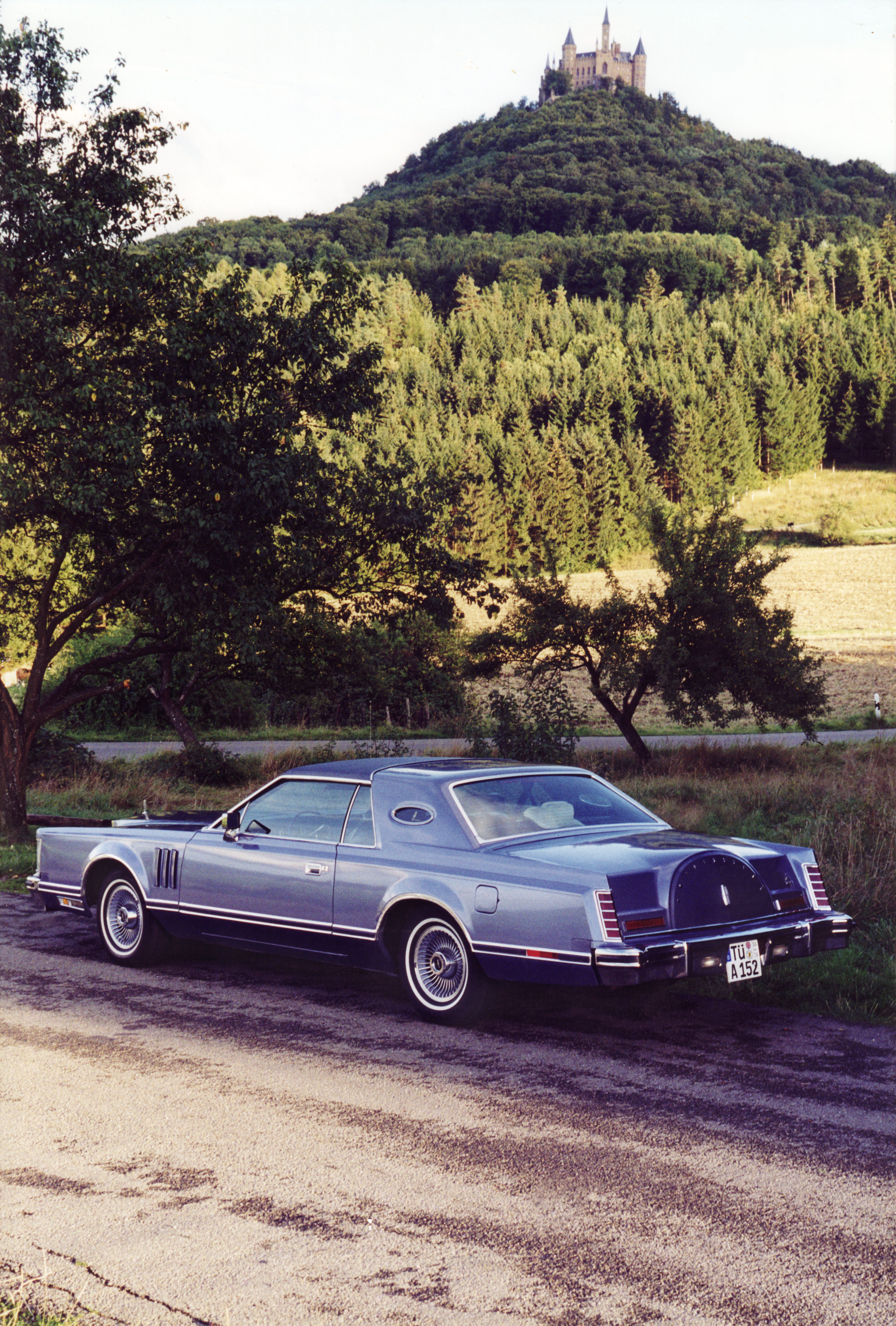 Dieses Bild wurde vor dem Schloss Hohenzollern in Hechingen, Baden-Württemberg (D), vom Eigentümer des MarkV Armin Arndt, Mössingen aufgenommen.